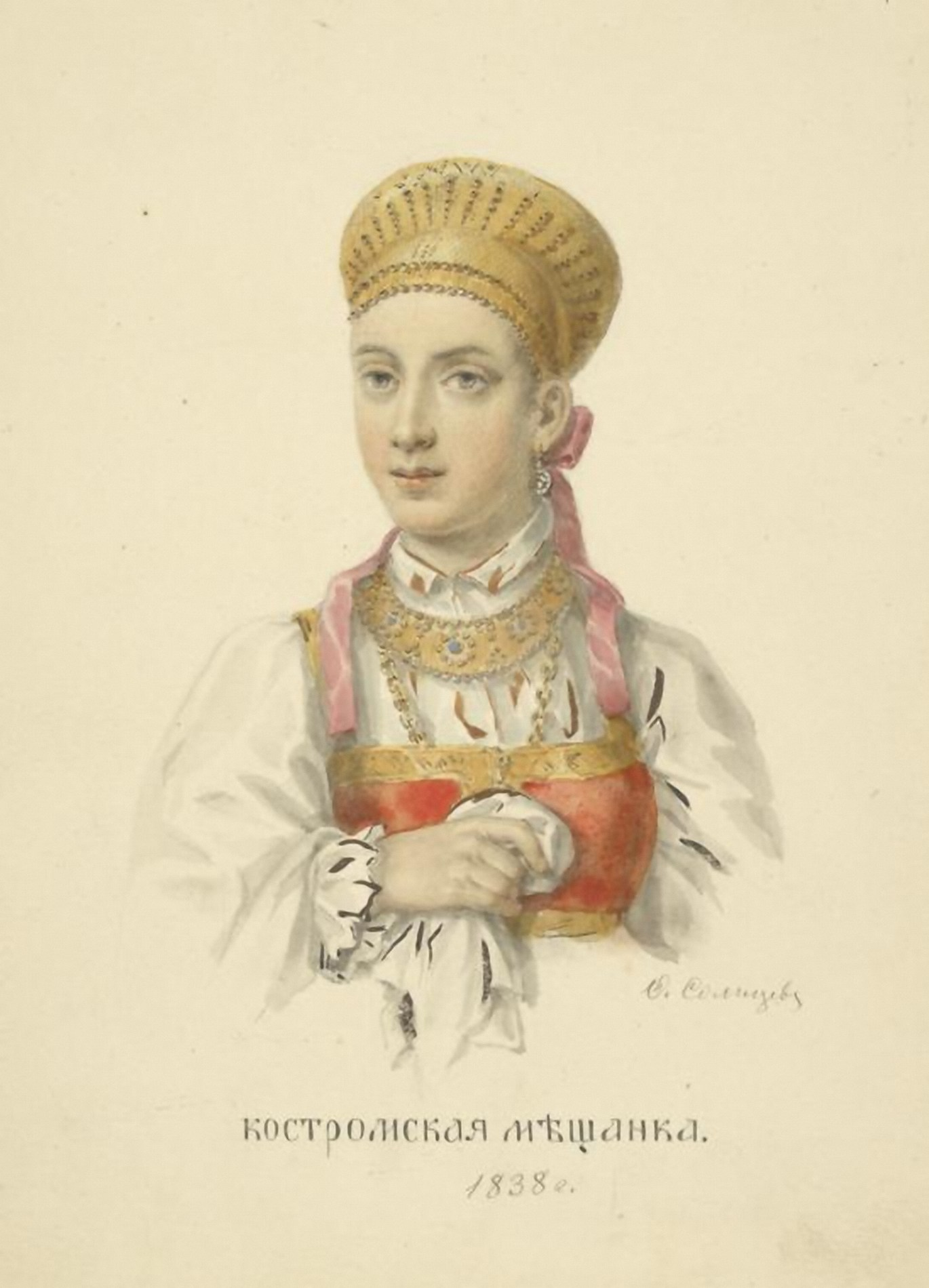 Костромская мещанка.